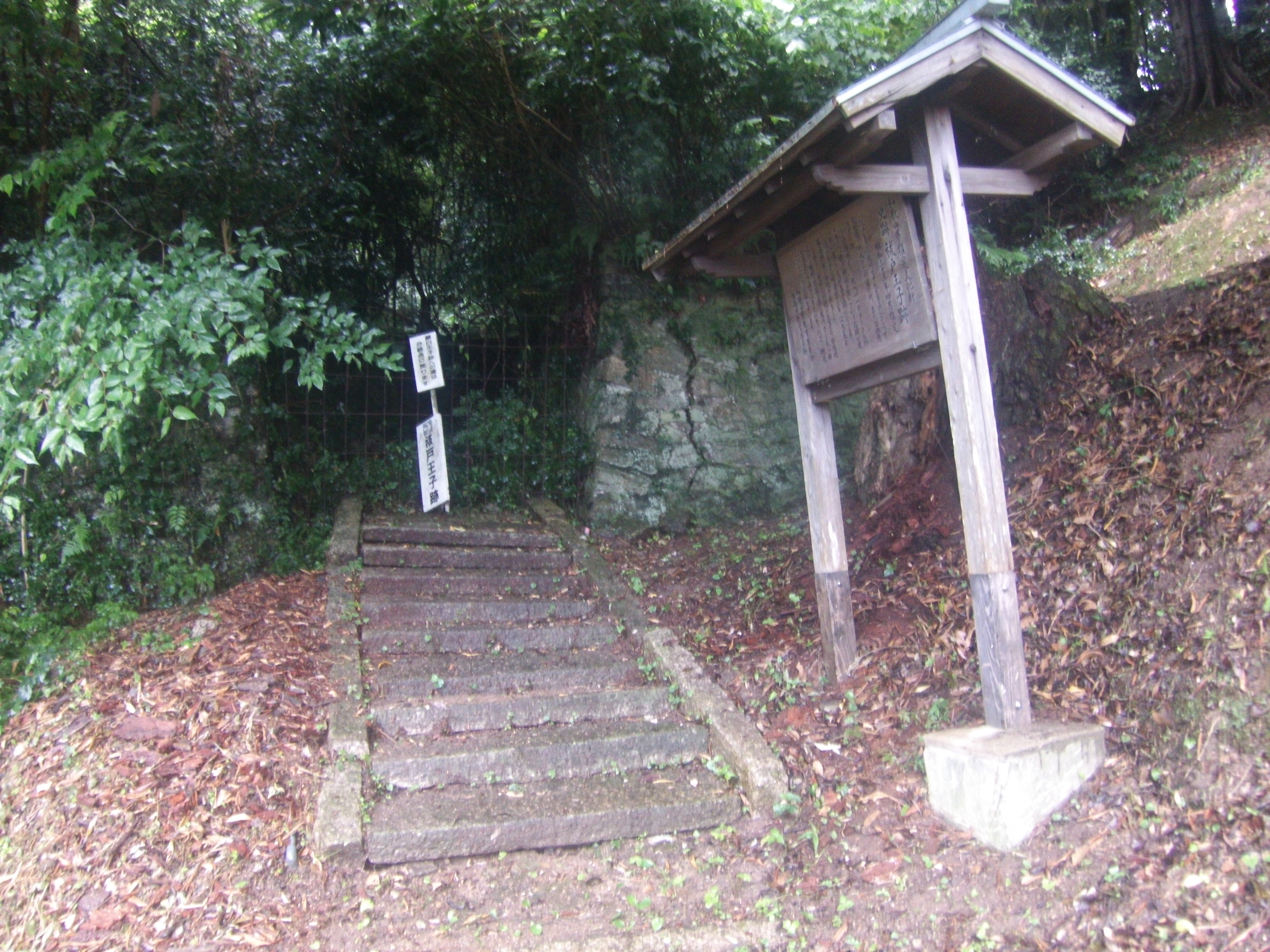 熊野古道・紀伊路の九十九王子の一つ祓戸王子（和歌山県海南市）